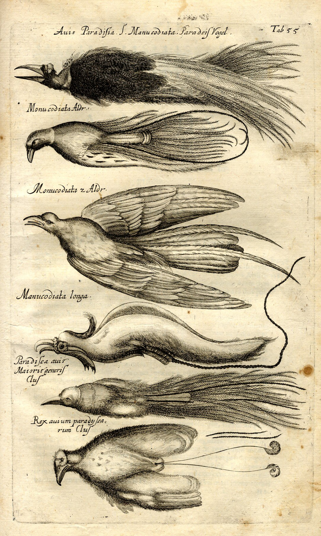 Paradiesvögel. Abbildungstafel aus (siehe Quelle)